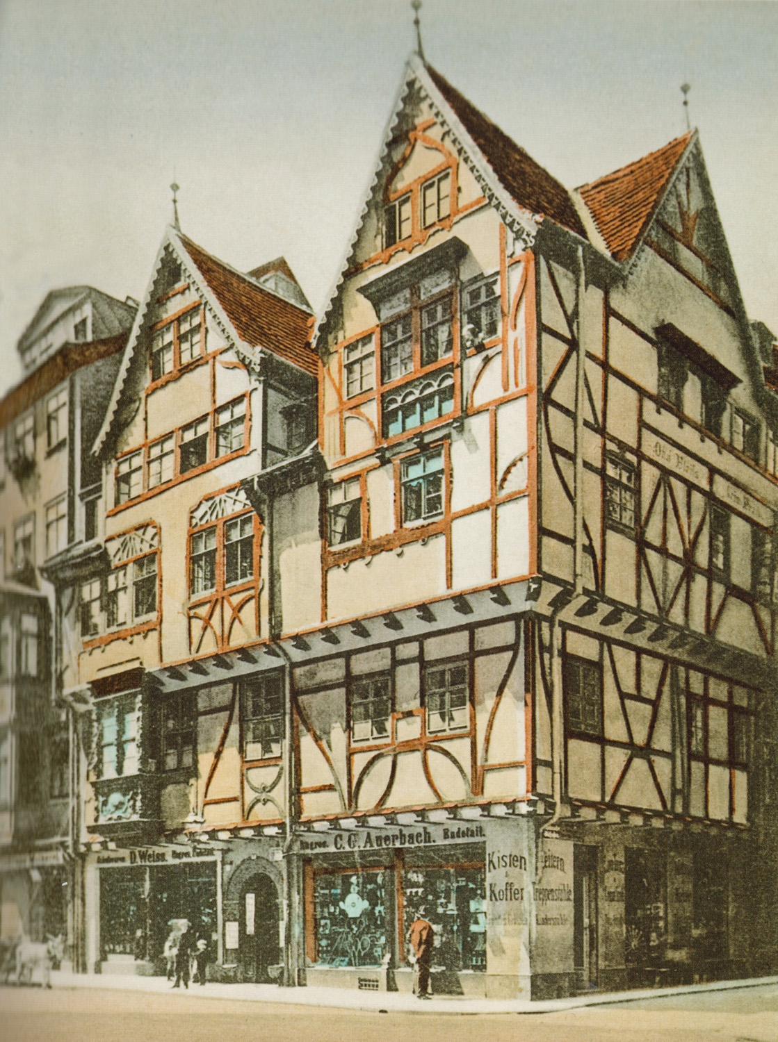 Das sogenannte "Nürnberger Häuschen" in Leipzig Nikolaistr. 9/Ecke Schuhmachergässchen um 1900. Erbaut um 1530, abgerissen für den Bau von Specks Hof.